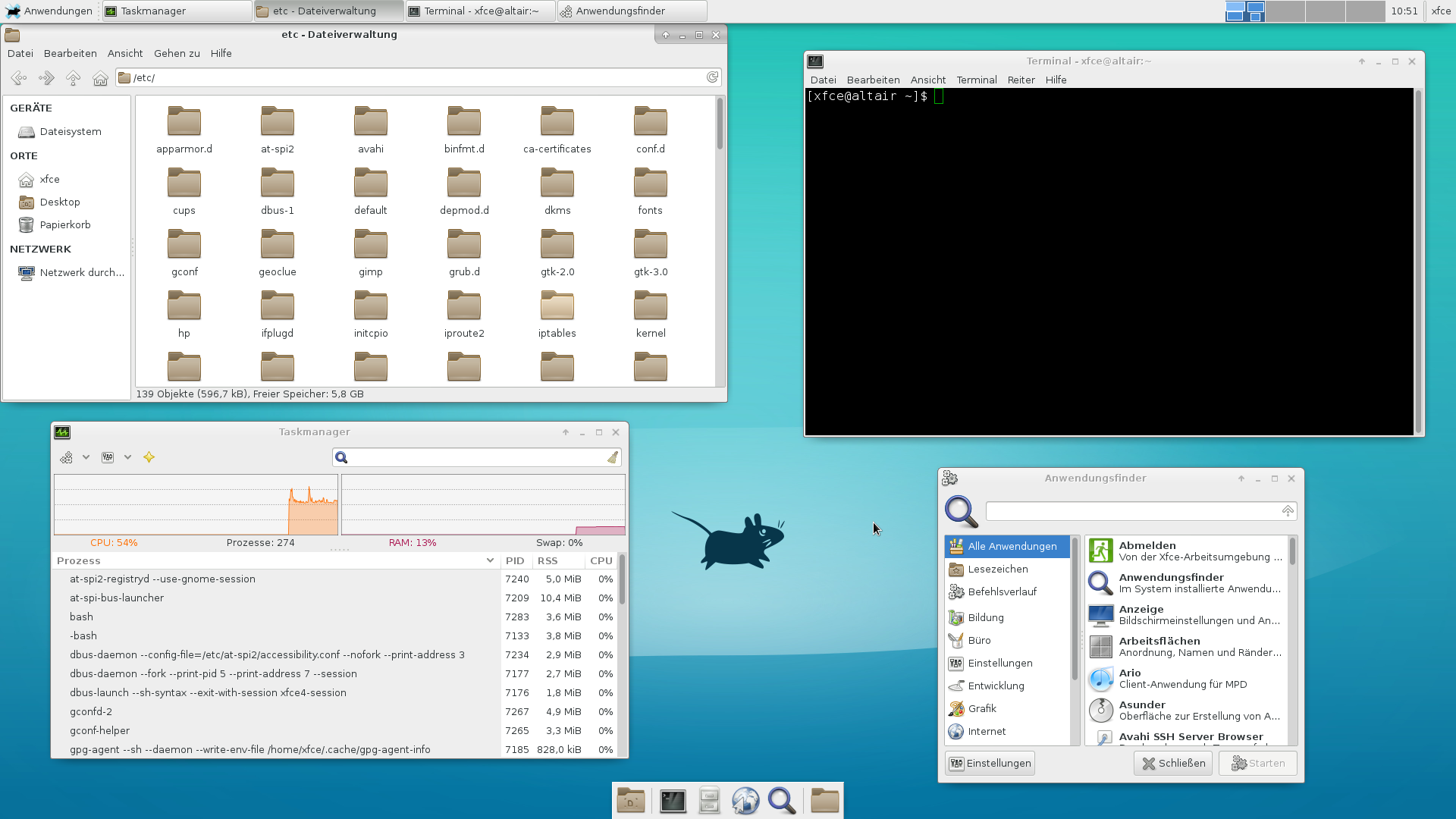 Xfce4.12 Screenshot